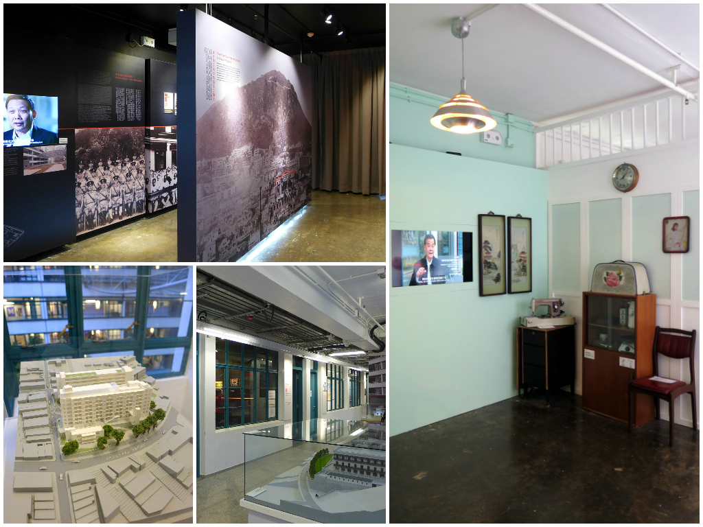 PMQ元創方5樓展覽區